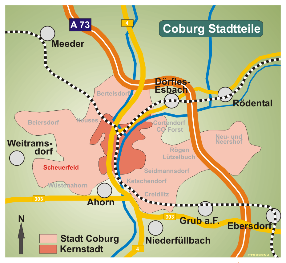 Karte von Coburg, Stadtteil Scheuerfeld